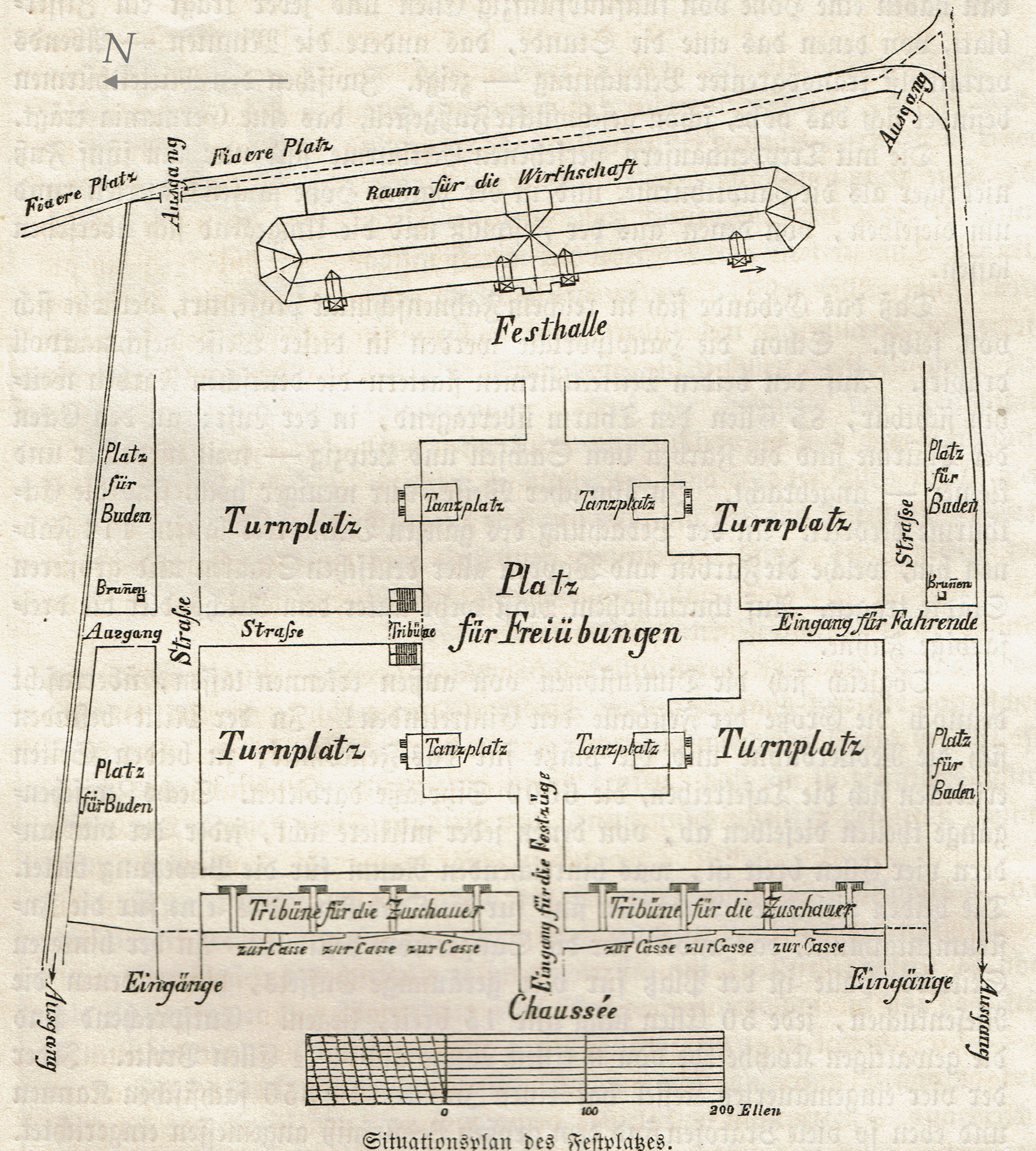 Allgemeines Deutsches Turnfest 1863 in Leipzig, Situationsplan des Festplatzes